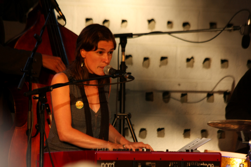 Eva De Roovere is een Vlaamse folkzangeres. -- Foto is genomen tijdens het optreden in het Park de Hoge Veluwe. Zwoele Zomernachten